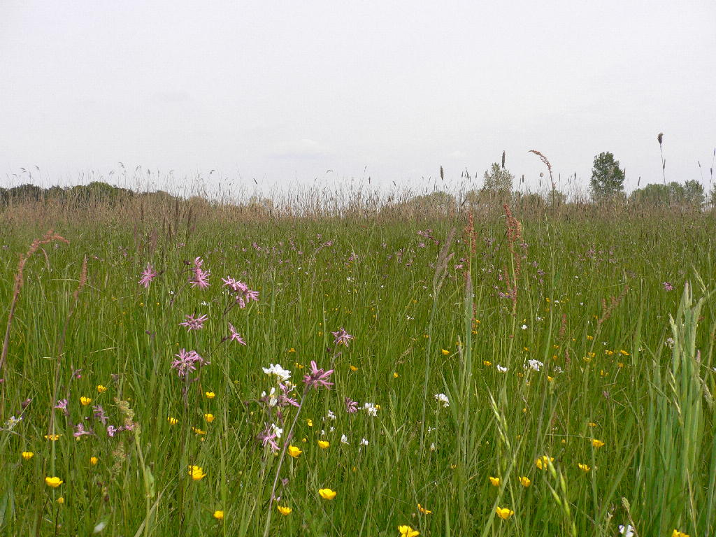 Eigen werk voor publicatie toevertrouwd aan de vereniging Natuurpunt Waasland Noord